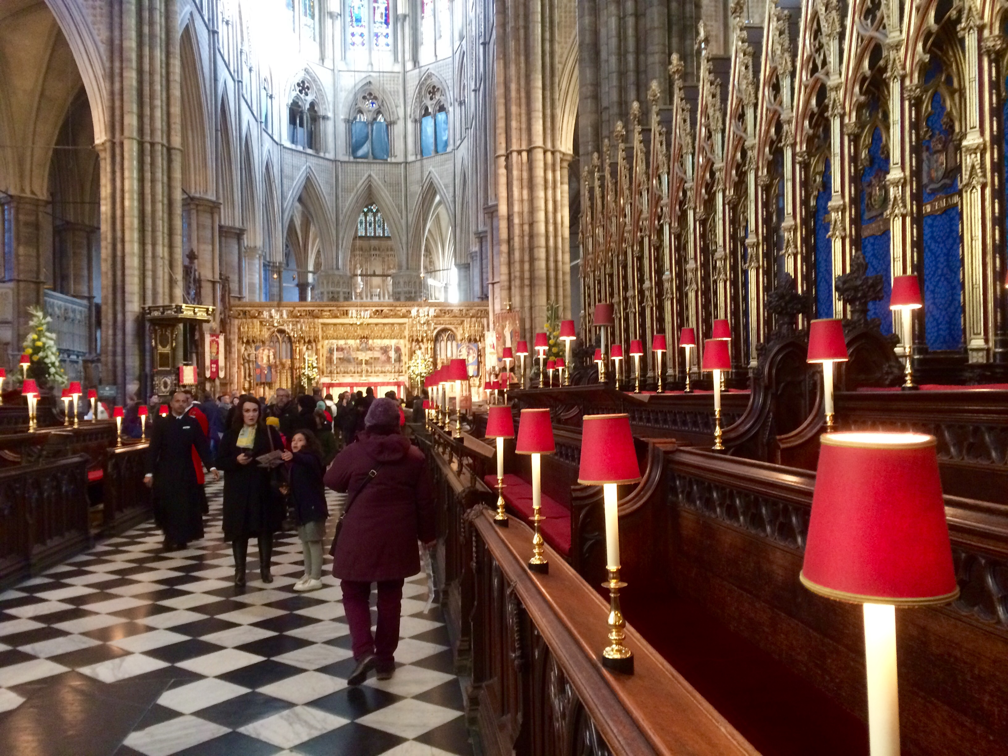 Interior of Westminister Abbey (Cathedral) in London